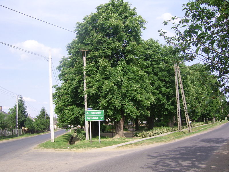 A balkányi Kossuth park bejárata a Kossuth utca felől